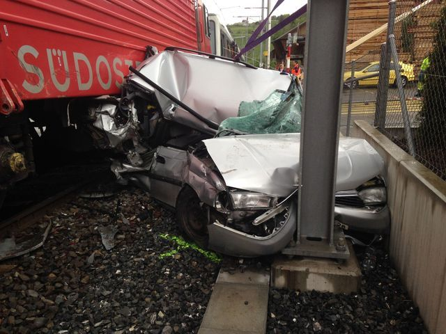 Am Freitagabend, 9. Mai 2014, kollidierten gegen 17.30 Uhr auf dem Bahnübergang auf der Ägeristrasse in Sattel der Voralpenexpress und ein Personenwagen. Dabei wurde der 58-jährige Autofahrer mittelschwer verletzt. Der Lokomotivführer überfuhr ein rotes Hauptsignal beim Bahnhof Sattel-Ägeri. Die Schranken des Bahnübergangs standen zum Unfallzeitpunkt offen.